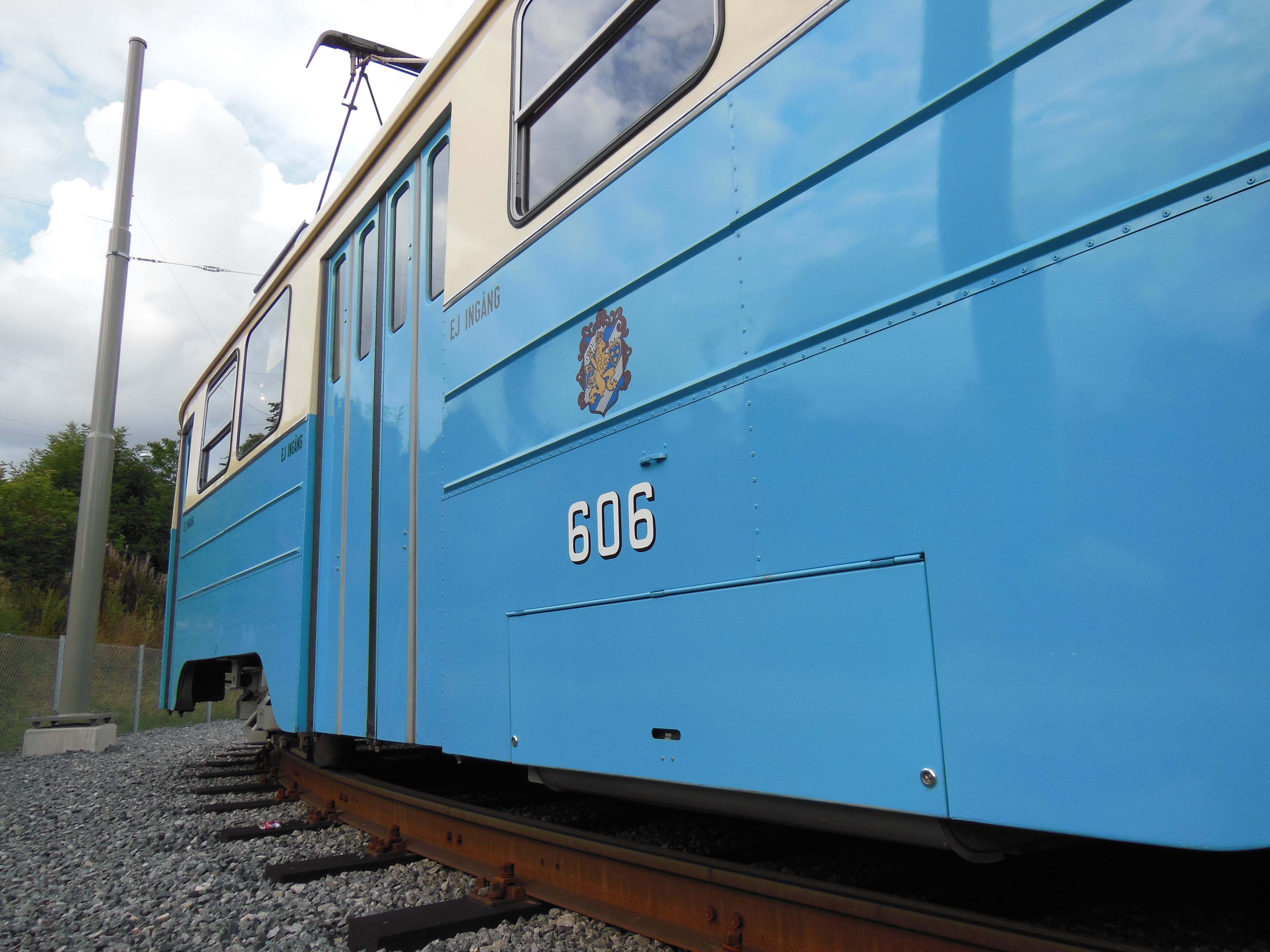 M25-spårvagn nummer 606 i Nymånegatans vändslinga, Göteborg.